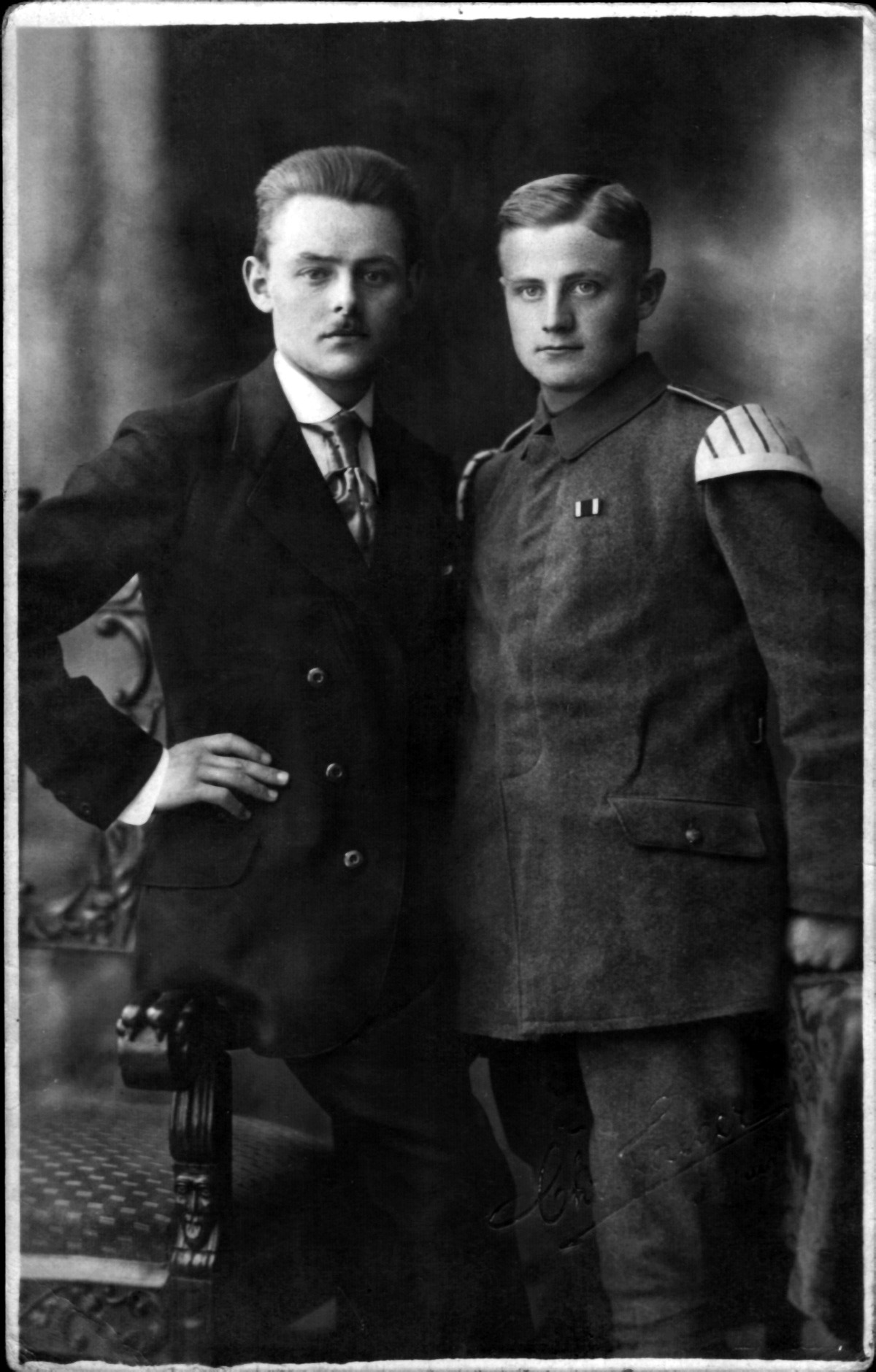 Tambour/Spielmann und Melder des 6. Rheinischen Infanterie-Regiments Nr. 68 auf Heimaturlaub in Mönchengladbach im Spätsommer 1917. Die Schulterstücke der Uniform machen den Soldaten als Tambour kenntlich und wurden auch Schwalbennester genannt. Der Soldat hieß Hubert Janzen (* 16. Februar 1898 in Mönchengladbach; † 10. Dezember 1990 in Königswinter) und nahm vom März 1916 bis zum Oktober 1918 am Ersten Weltkrieg teil. In den letzten Kriegstagen erlitt er eine Gasvergiftung und erhielt einen Granatsplitter ins linke Bein, an deren Folgen er den Rest seines Lebens litt. Aufgrund seiner Verletzungen wurde er im Zweiten Weltkrieg nicht wieder eingezogen. Er war zu der Zeit im Zivilberuf Schreinergeselle und ist hier mit seinem Bruder Gerhard abgebildet. Das Foto wurde aus Anlass der elterlichen Silberhochzeit aufgenommen. Die im Bild sichtbare Krawatte stammte mit Sicherheit aus regionaler, höchstwahrscheinlich aus Krefelder Produktion.